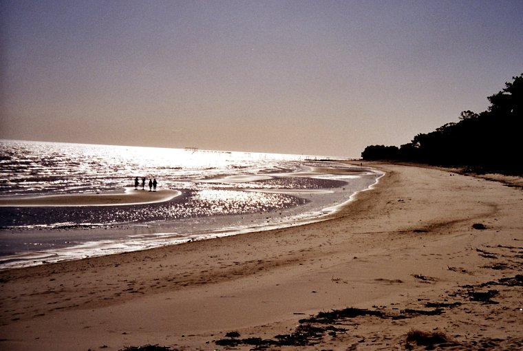 Río de la Plata. taken by יואב רוזנברג.